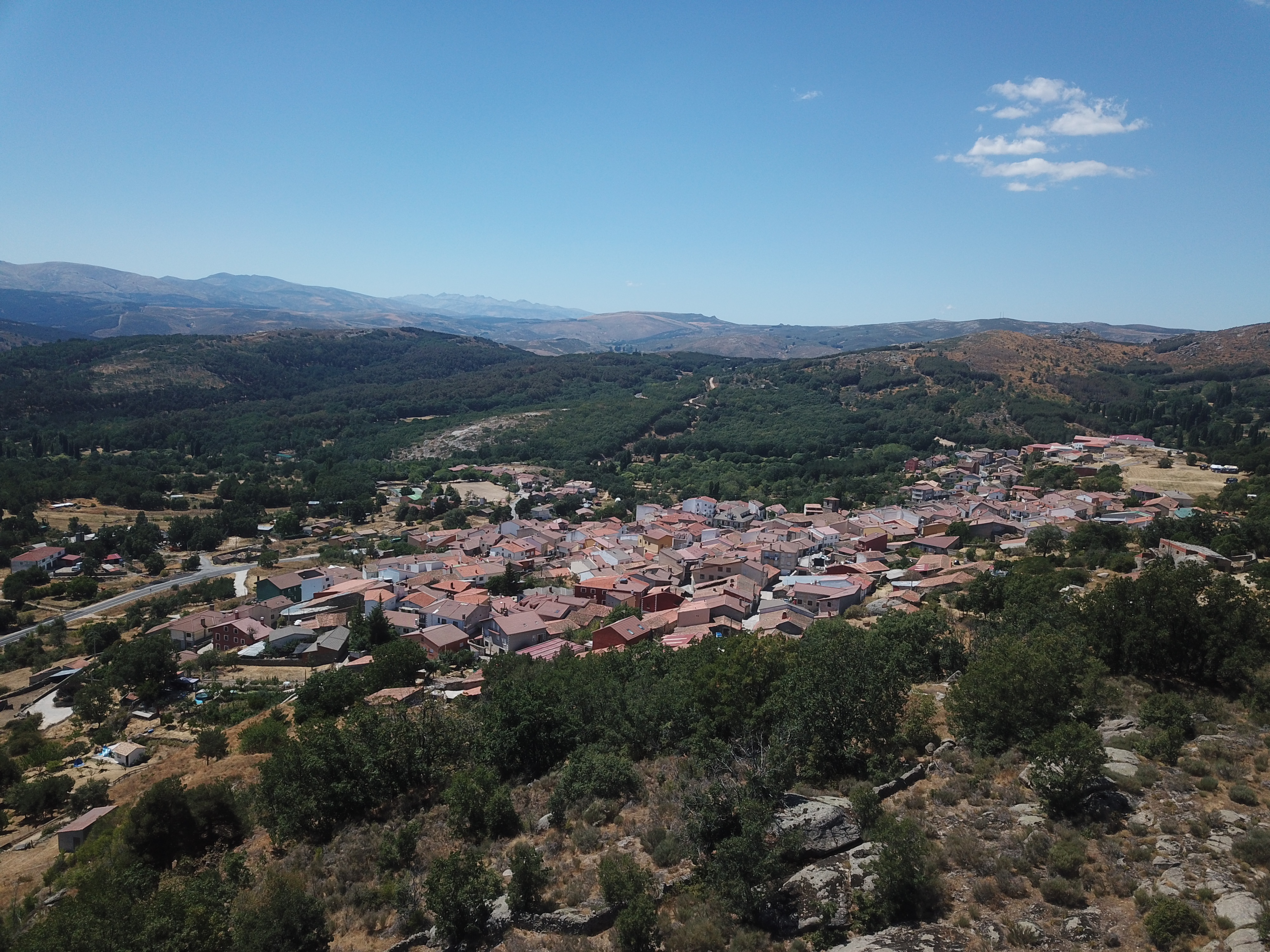 Hoyocasero foto aerea 2019